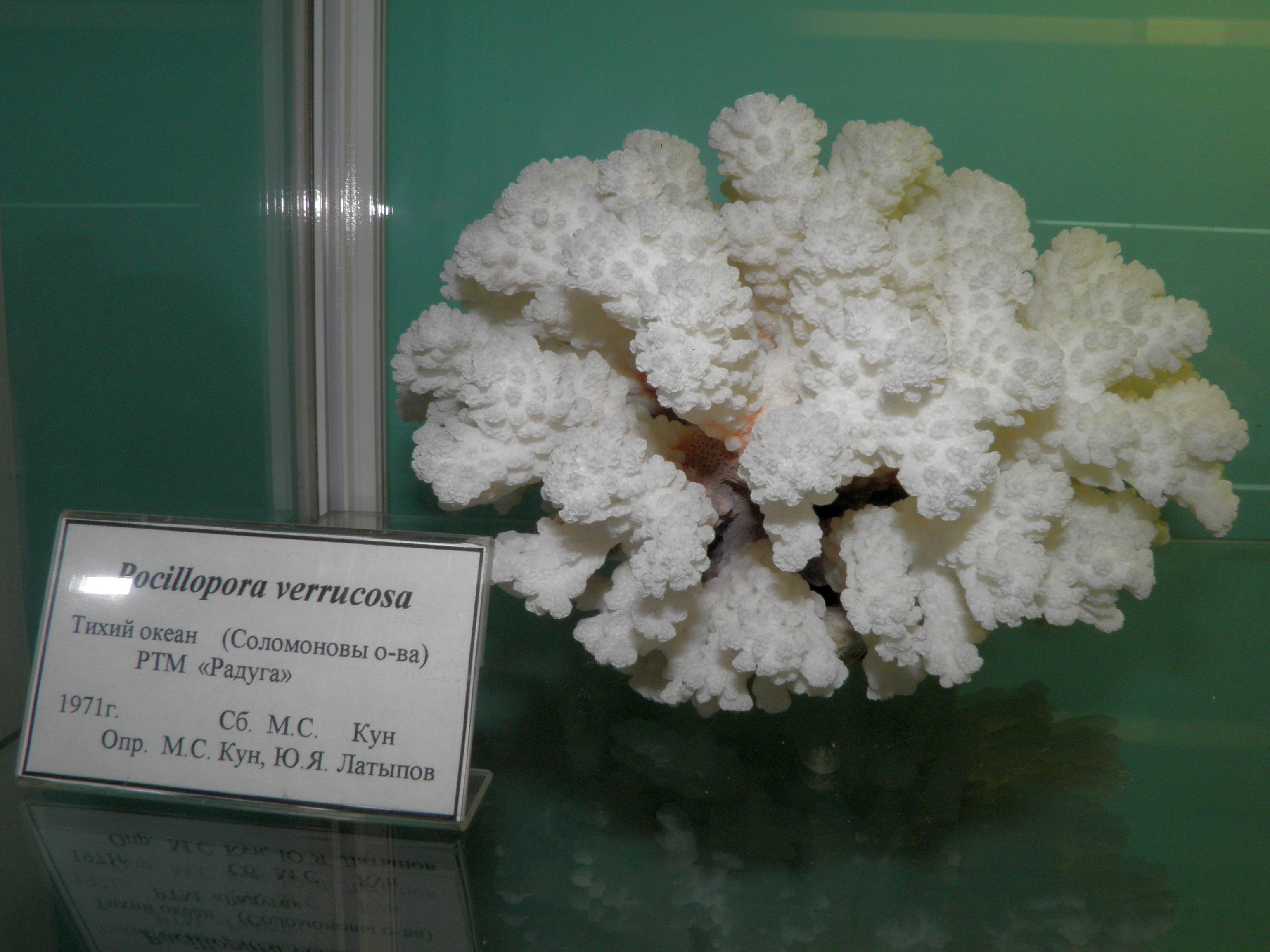 Pocillopora verrucosa в океанариуме Владивостока